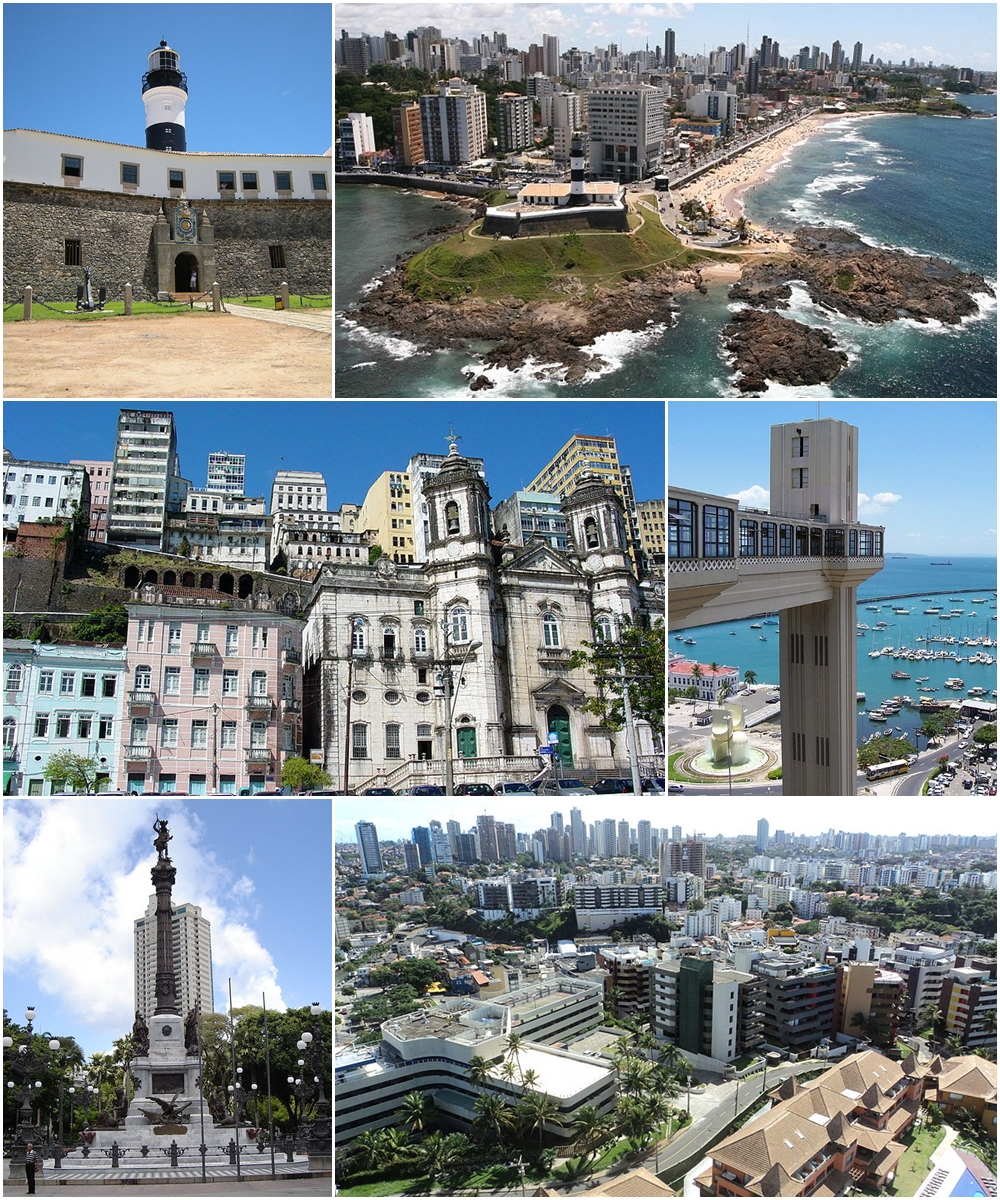 Montage fotográfico de Salvador de Bahía, capital del estado de Bahía.